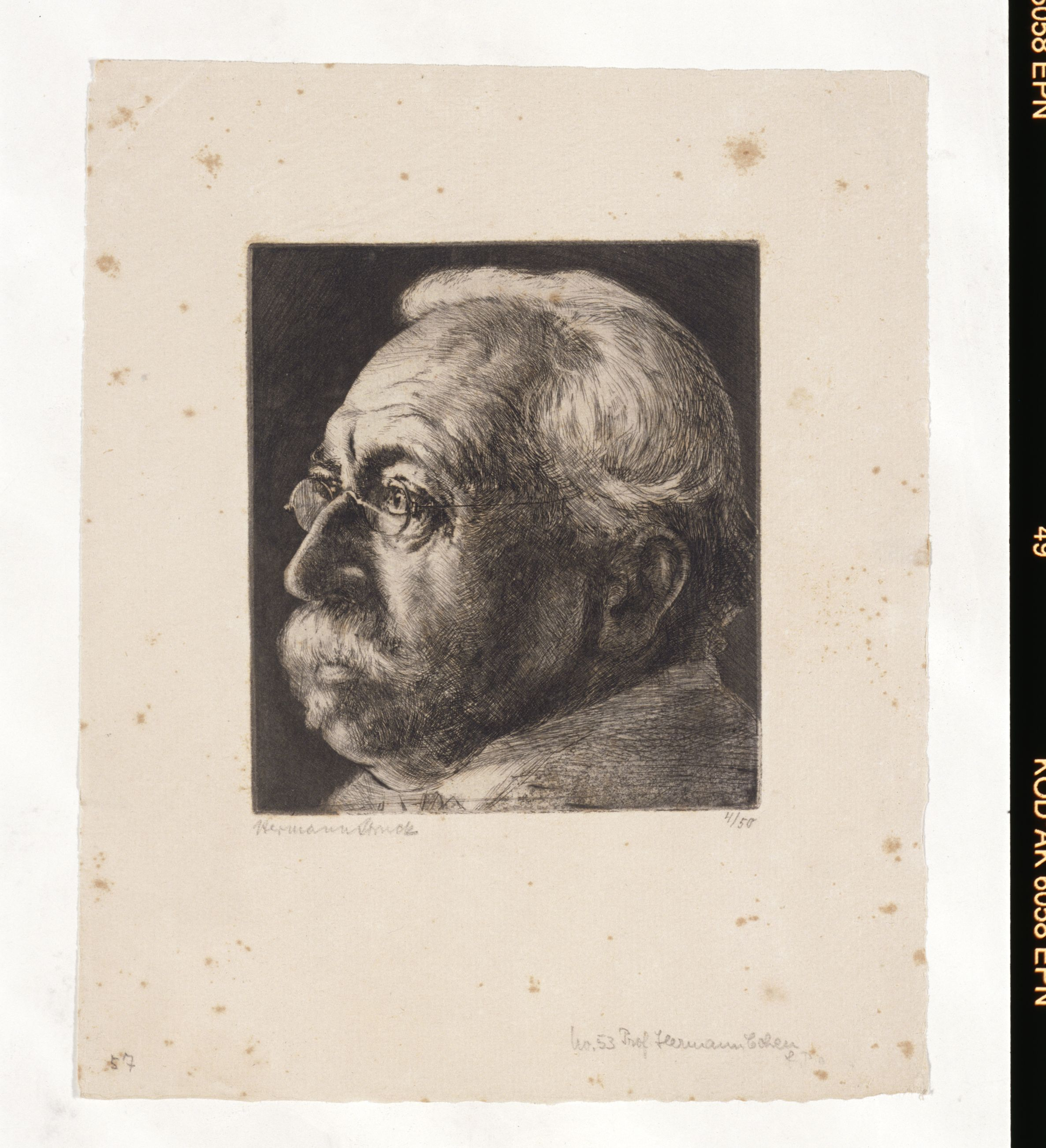 Artwork by Hermann Struck Dargestellte Person: Cohen, Hermann (1842 - 1918), DNB-Link Datierung Display: 1903 Objektart: Radierung Schlagworte Inhalt /Geografie: Mann, Porträt, Brille Schlagworte Kontext: Philosoph, Hochschullehrer